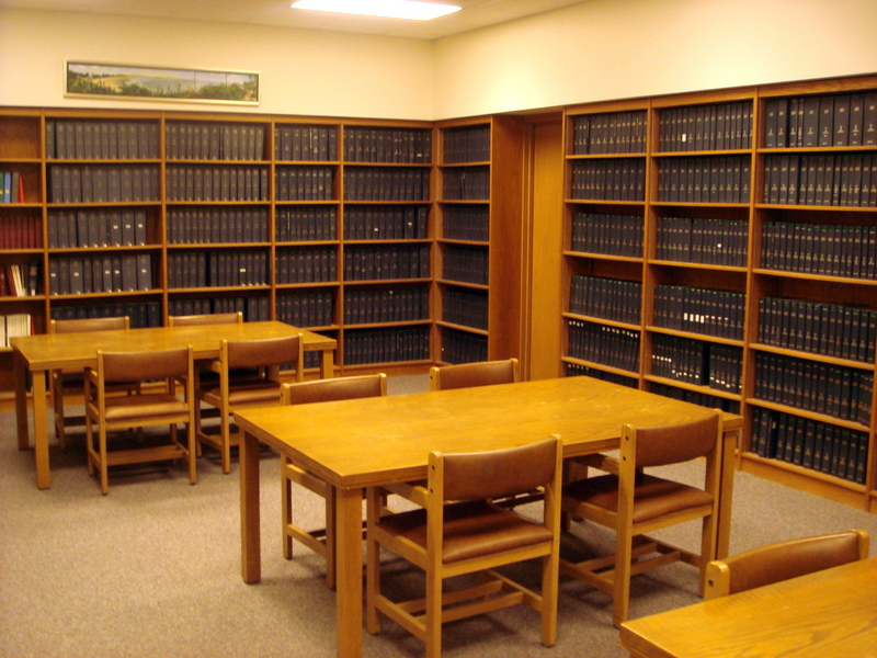 Federal Register Room in UC Law Library #1